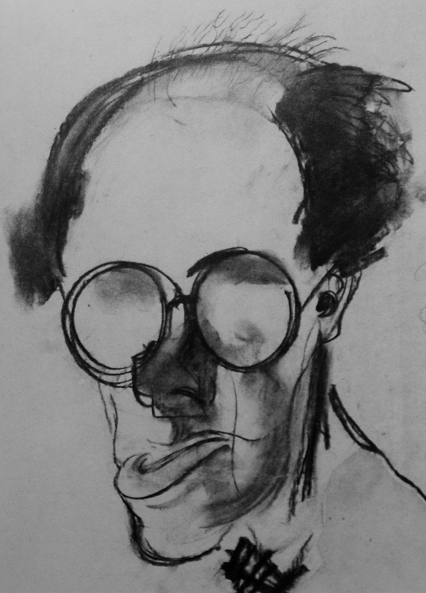 Gustaf Magnusson. Karikatyrteckning av konstnärsvänner utförd av konstnären John Jon-And, utgiven postumt efter hans död 1941 i boken Konstnärer Gebers Förlag.